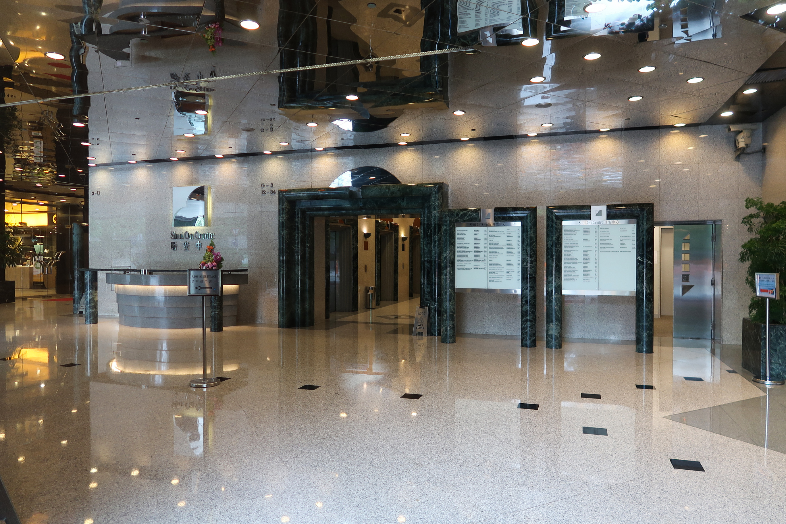 Shui On Centre Lobby